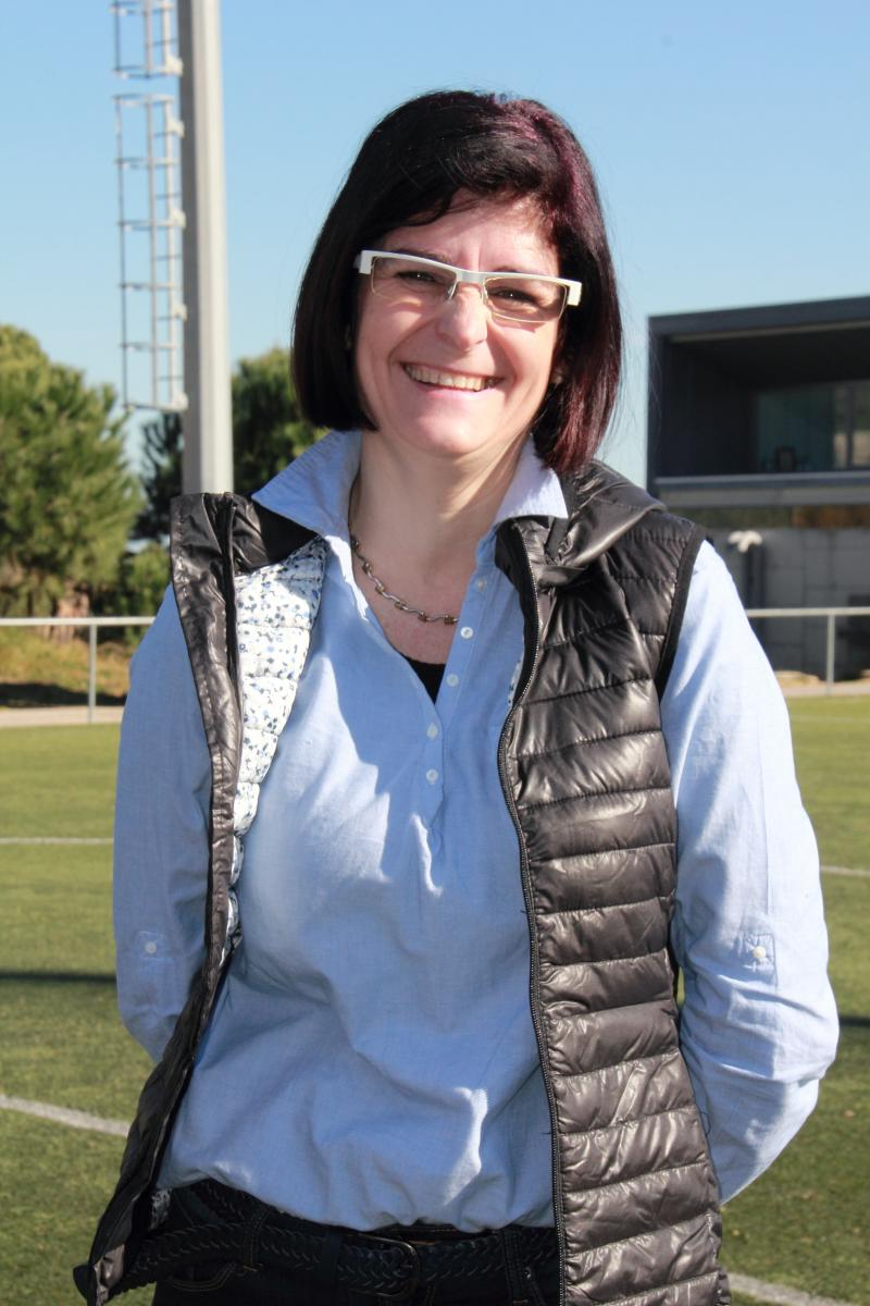 María Reyes Sobrino en el Gran Premio de Marcha de Viladecans de 2015.